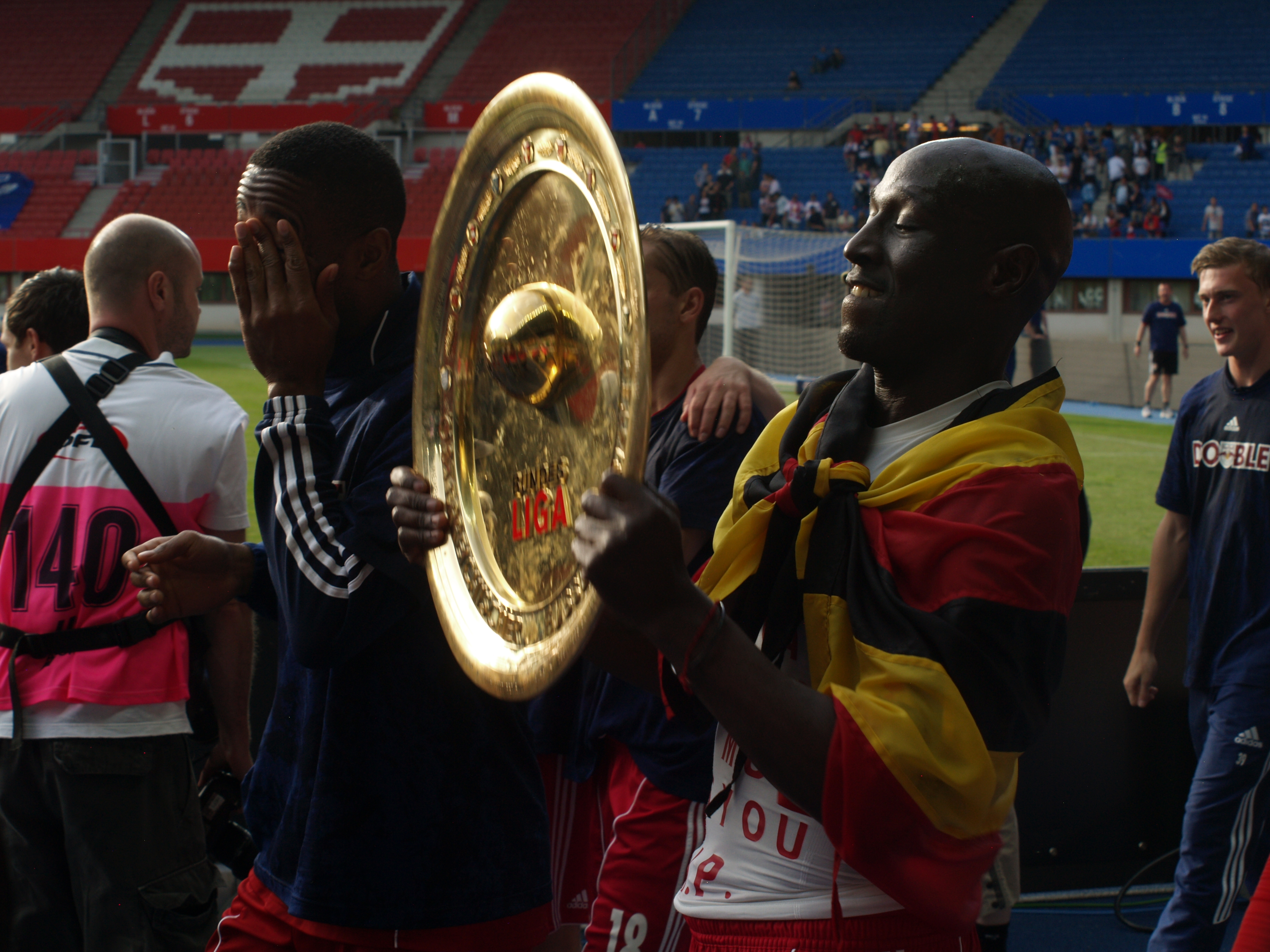 Ibrahim Sekagya mit Meisterschale nach dem ÖFB-Cupfinale 2012